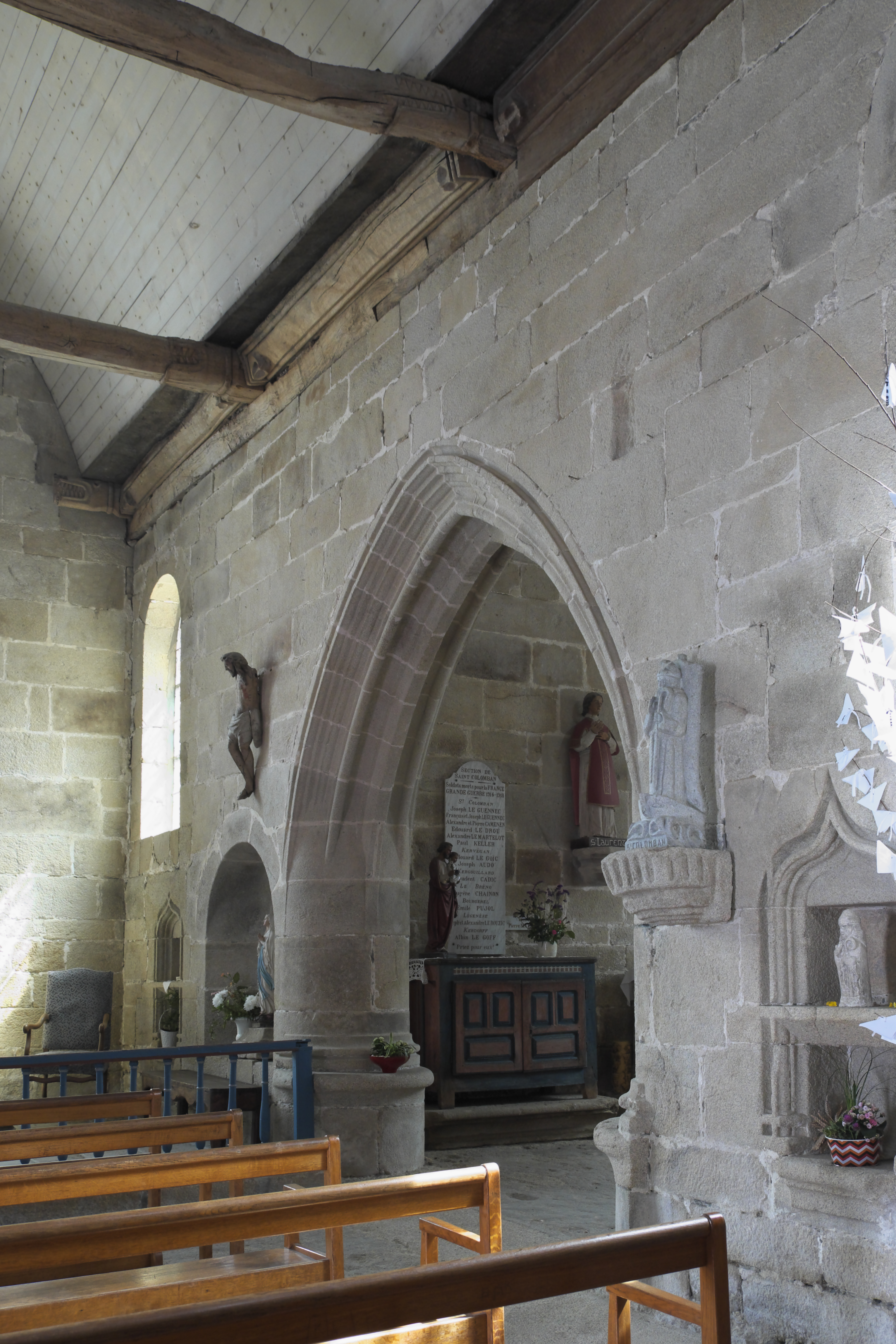 Kapelle Saint-Colomban in Saint-Colomban, einem Ortsteil von Carnac im Département Morbihan (Region Bretagne/Frankreich), Innenraum